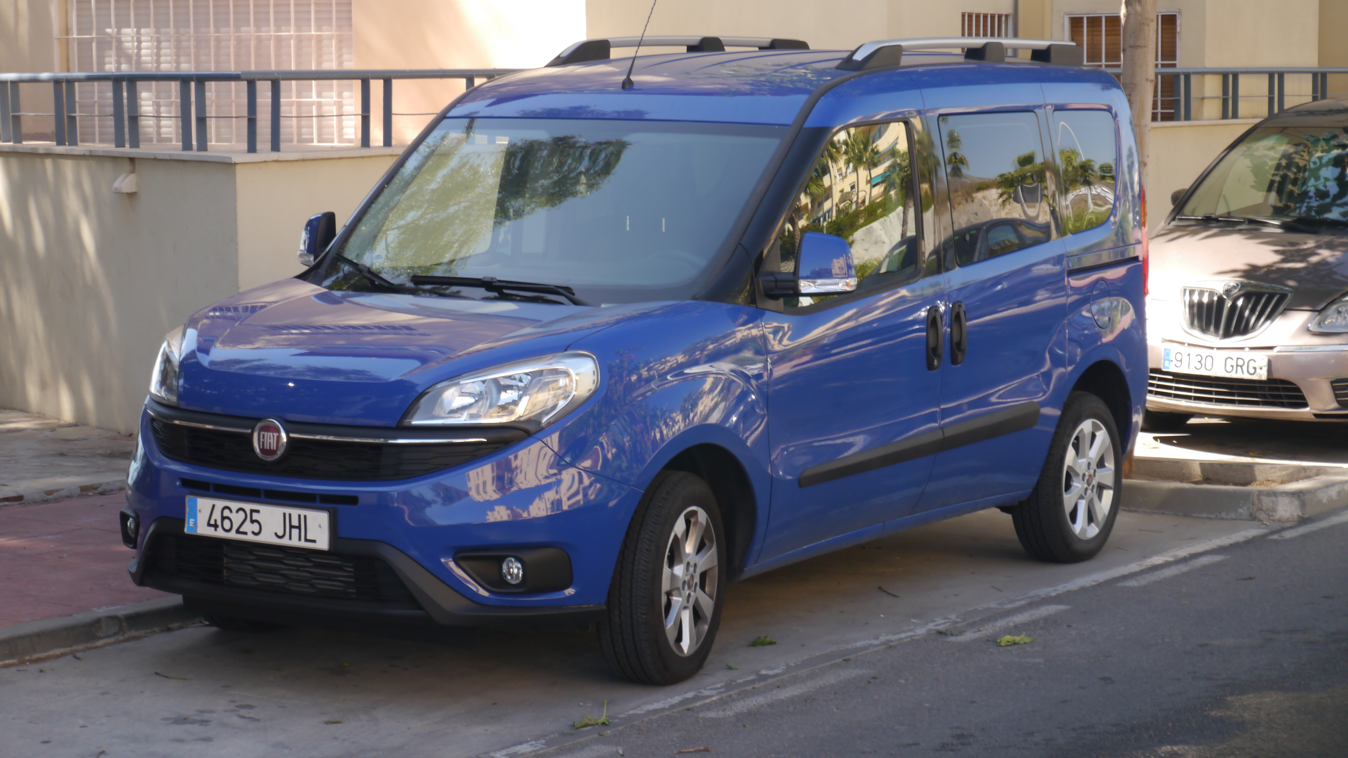 Malaga, Costa Del Sol, Spain.